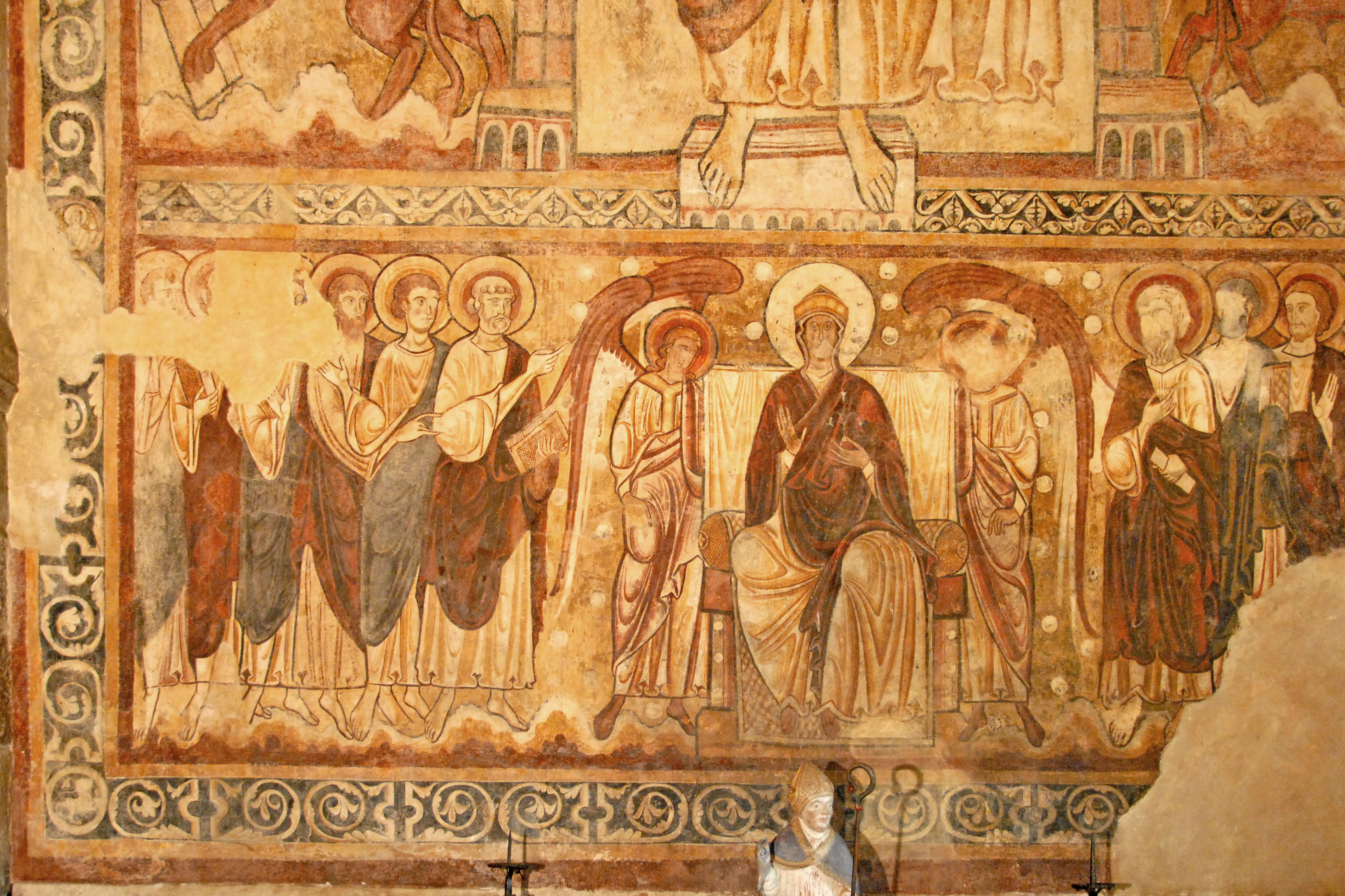 Abtei St.-André Lavaudieu, Refektorium, Detail Fresko, unterer Rand